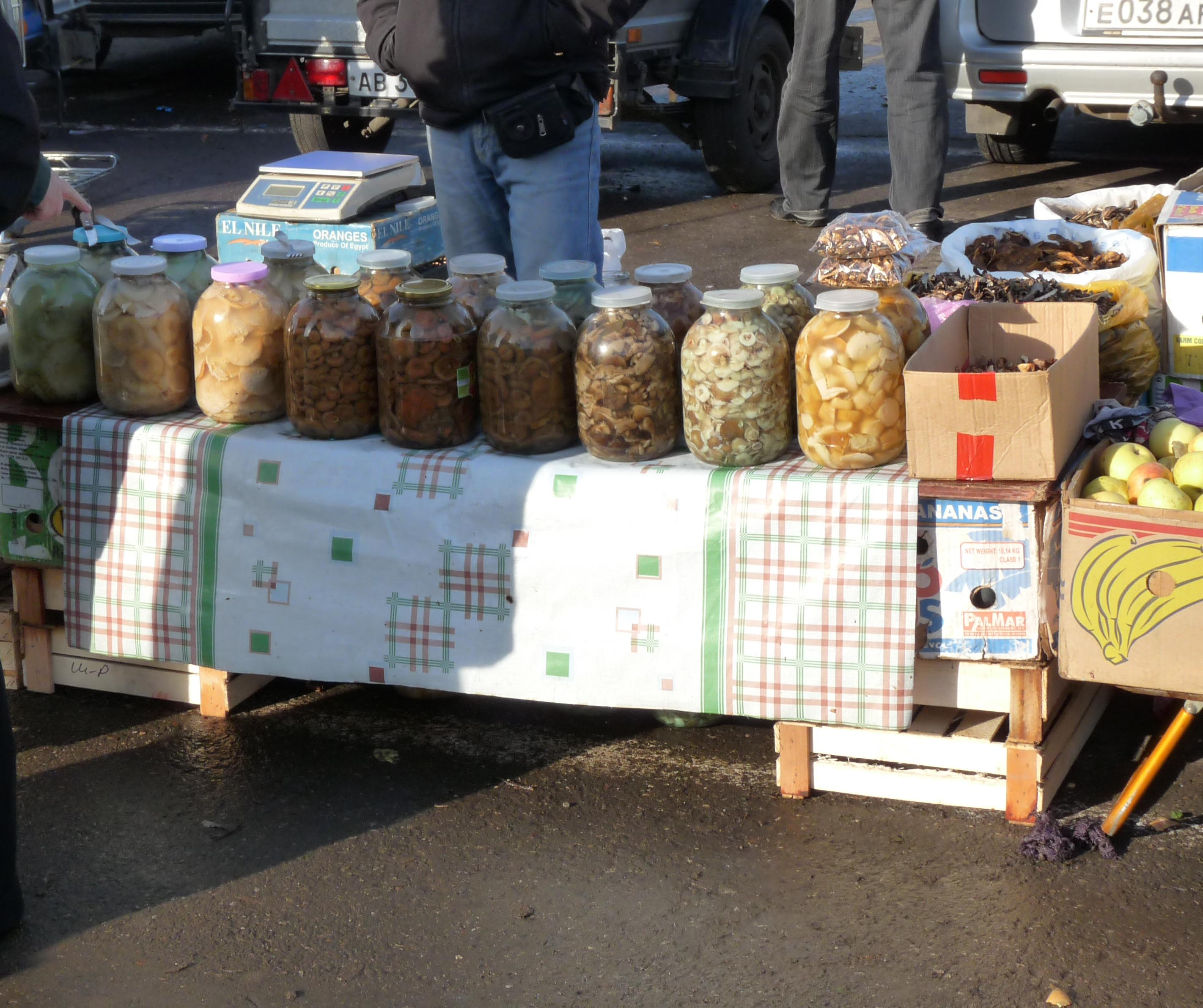 Samara Market 06 Pickled mushrooms